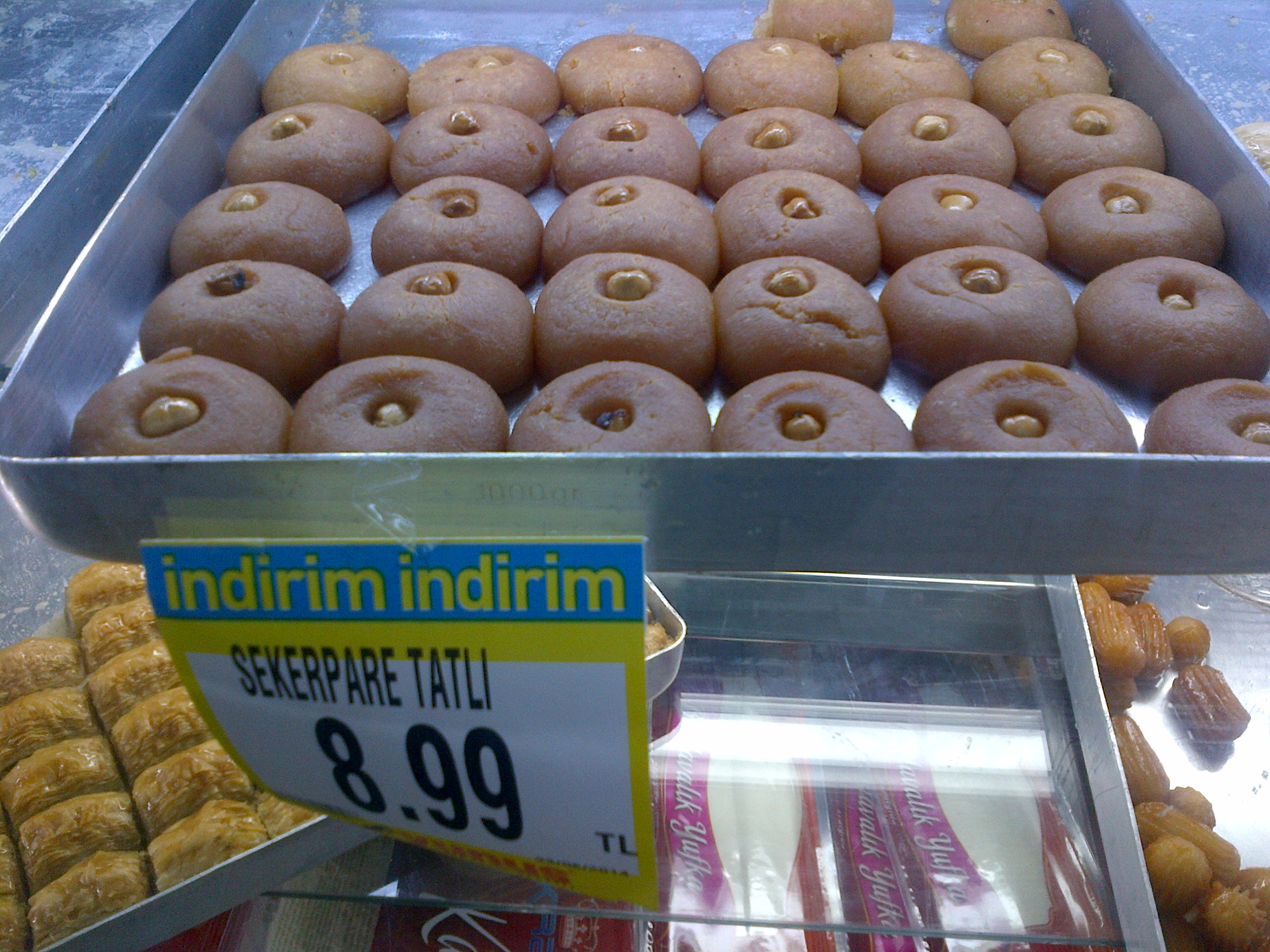 Şekerpare es un postre de masa y jarabe, de la cocina turca